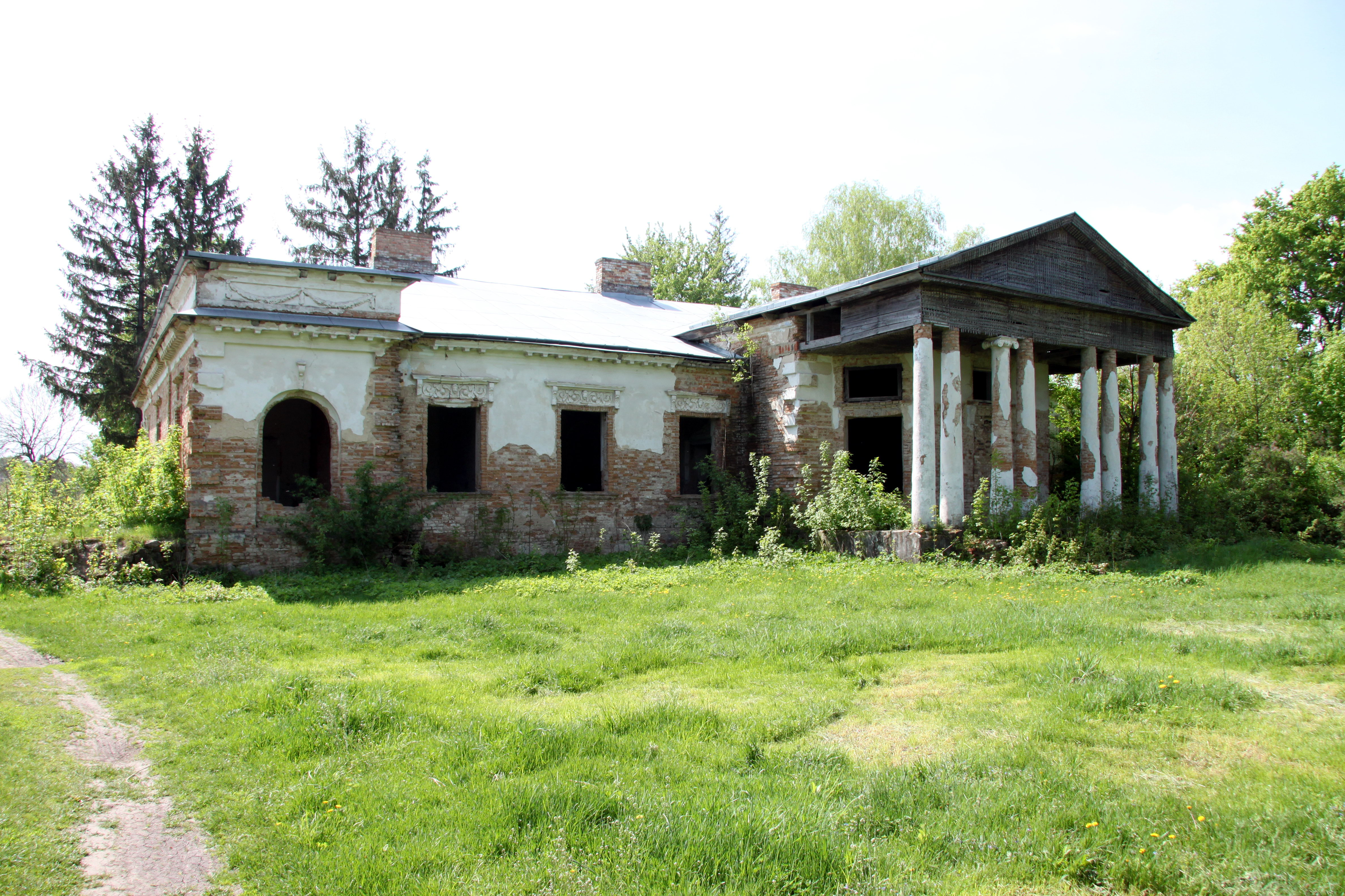 Палац Тора Ланге, вул. Новоселів, 3, Нападівка